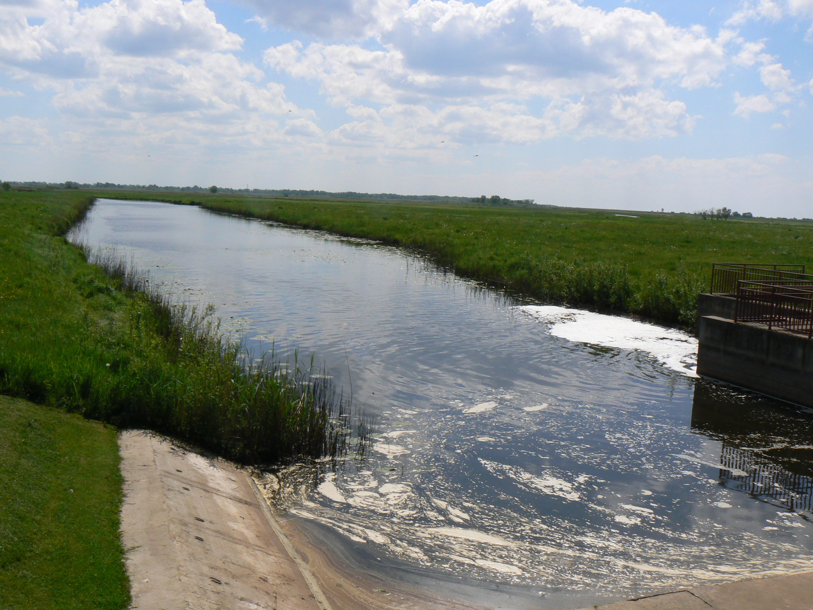 Ulmas proti proudu z mostu u polderové čerpací stanice (2007)